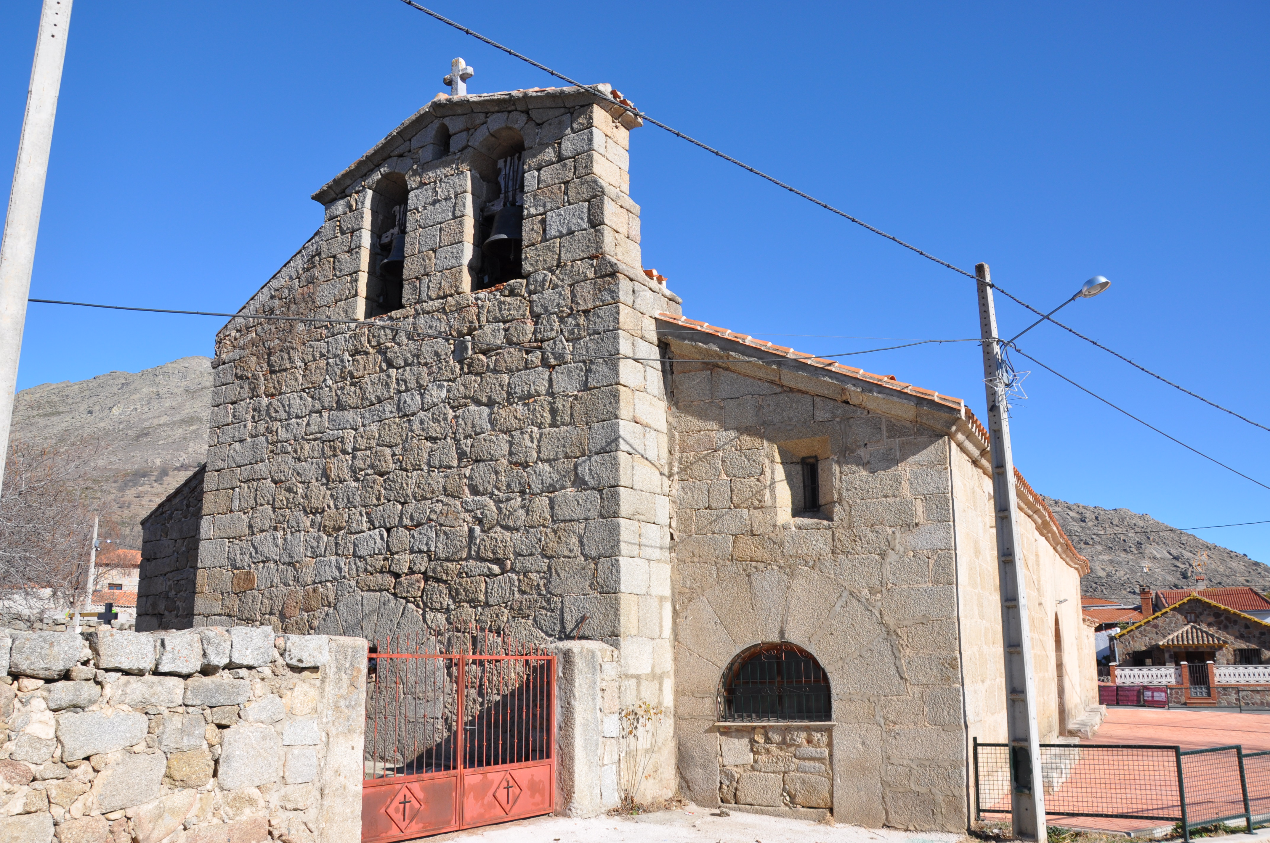 Iglesia parroquial de San Juan Bautista en San Juan del Molinillo, Ávila, España